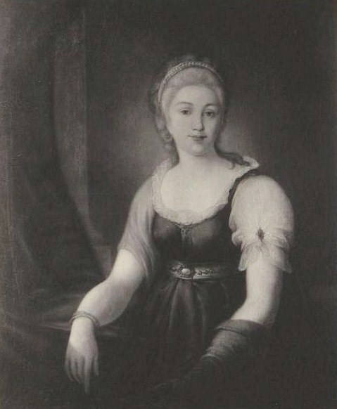 Княгиня Варвара Аркадьевна Голицына, ур. Моркова (1797—1835)